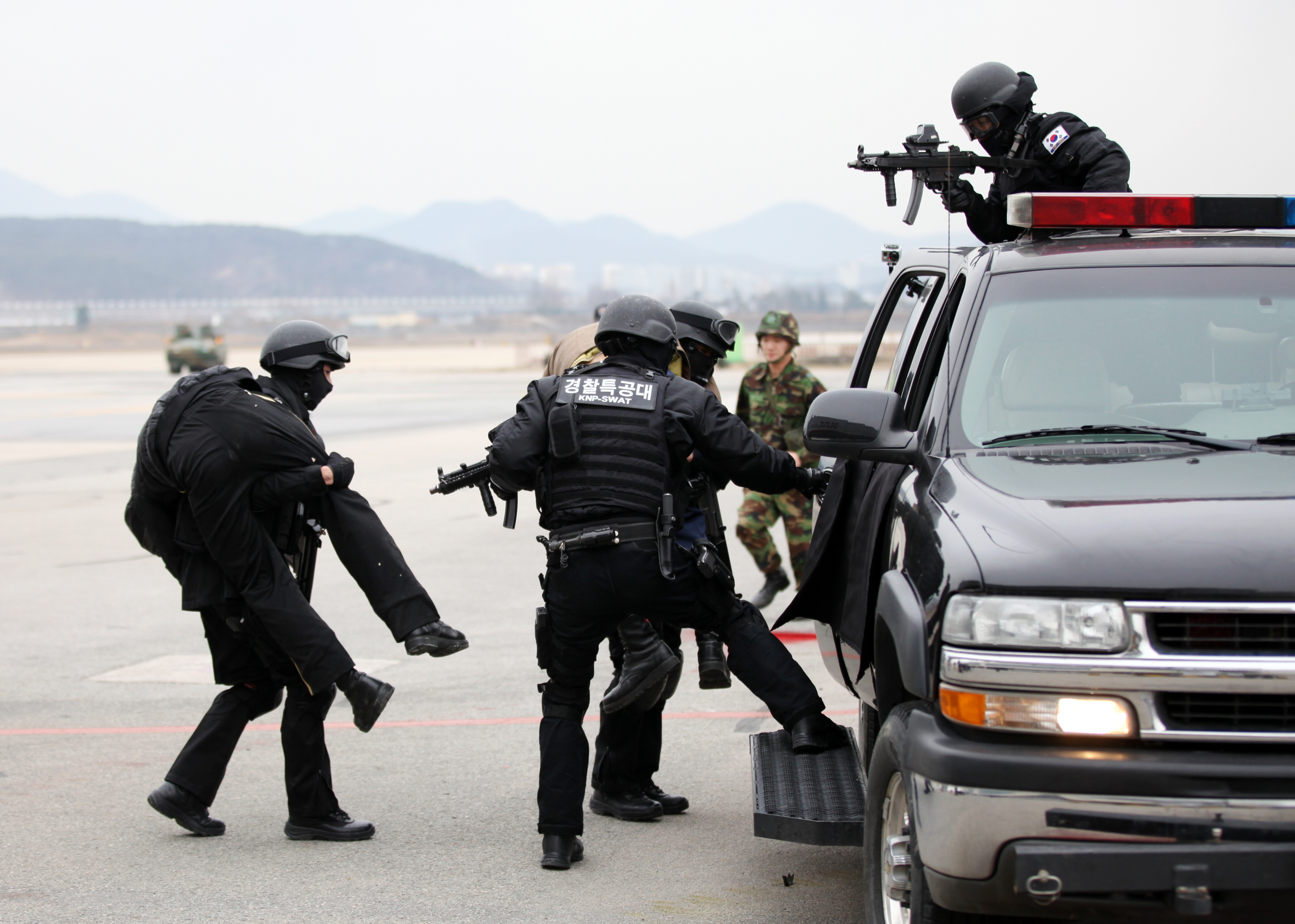 2012년 2월 공군 1전비 공항 대테러 훈련(15)